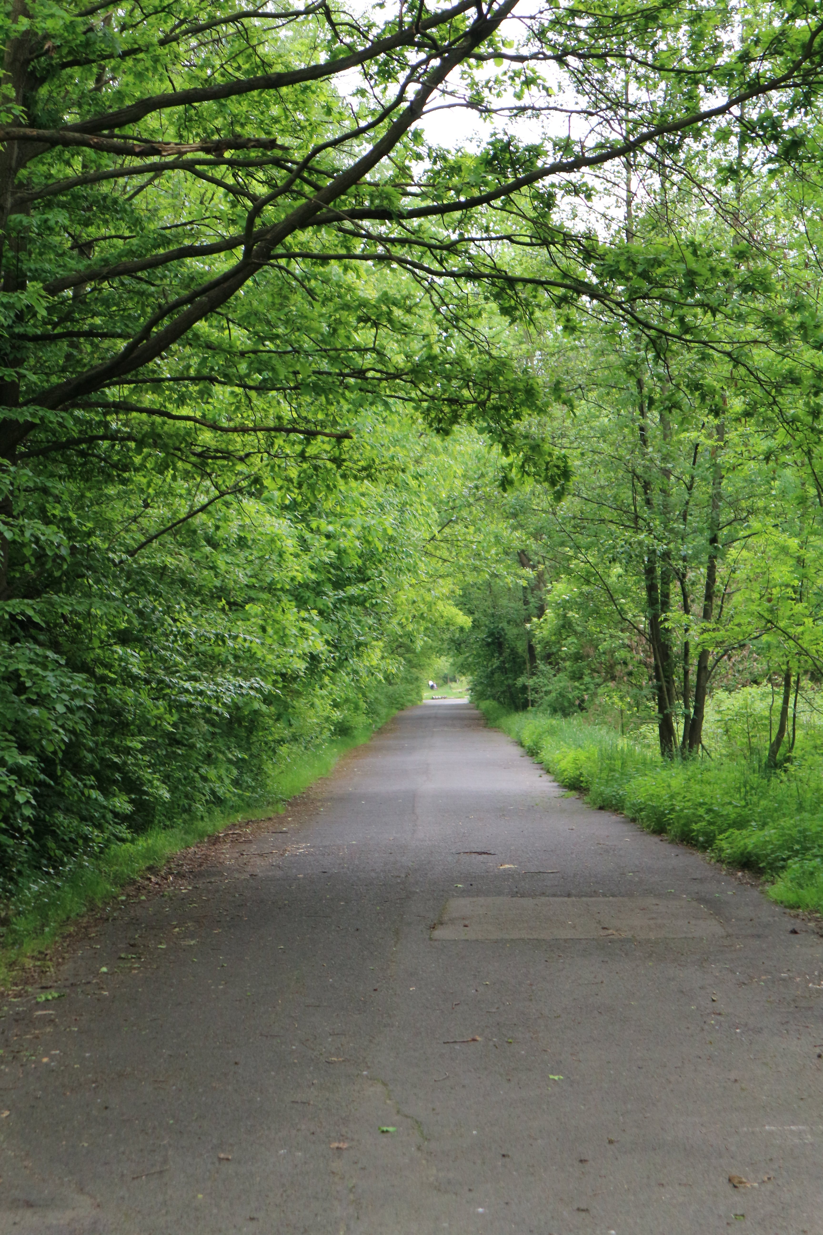 Alejka na Dolince Murckowskiej w Katowicach (Polska)